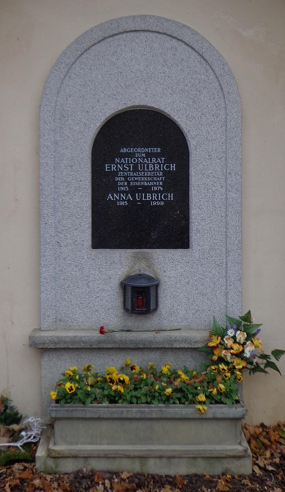 Feuerhalle Simmering - Abteilung ML (Umfassungsmauer): Urnengrab von Ernst Ulbrich